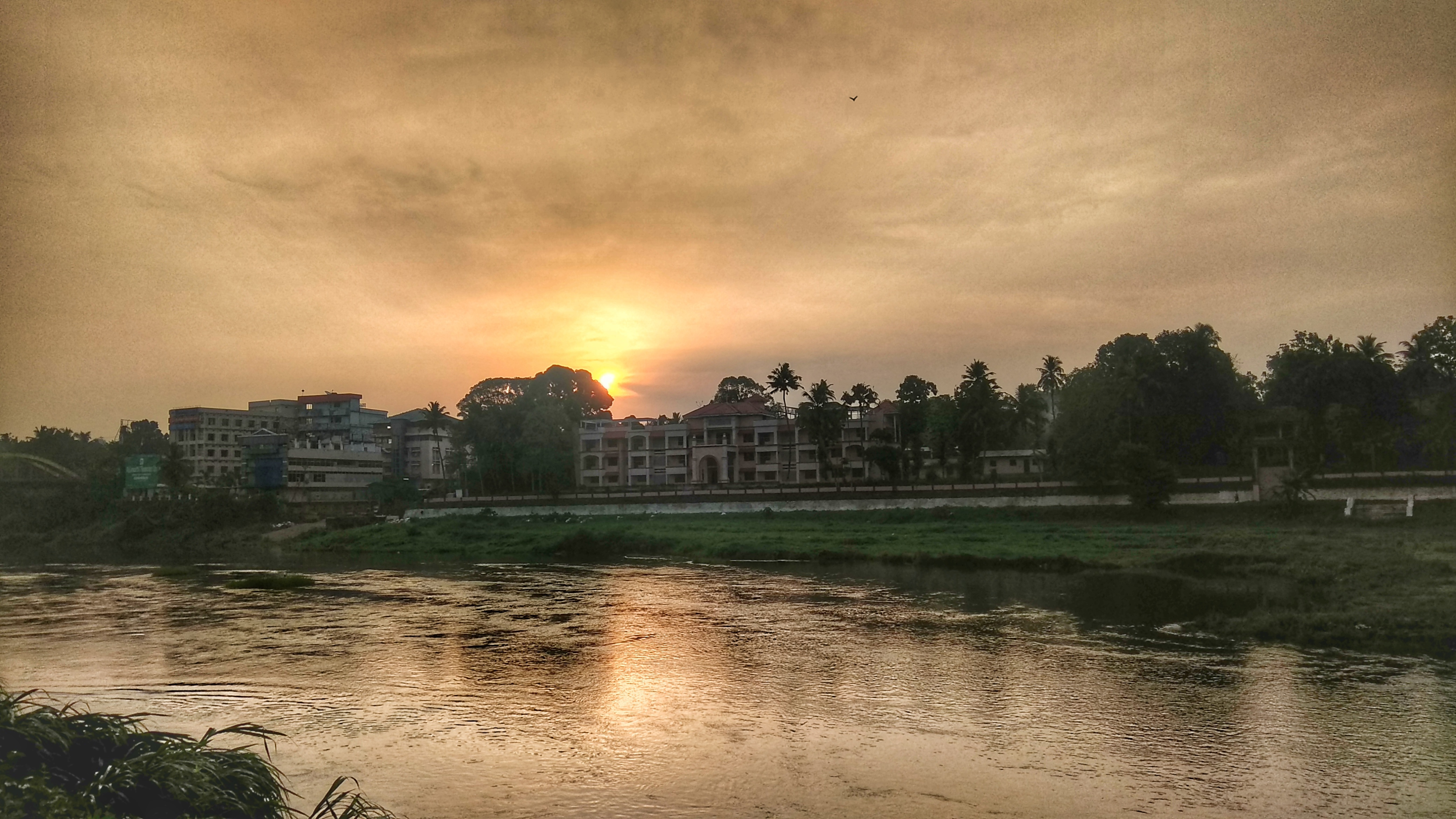 Pamba river maramon